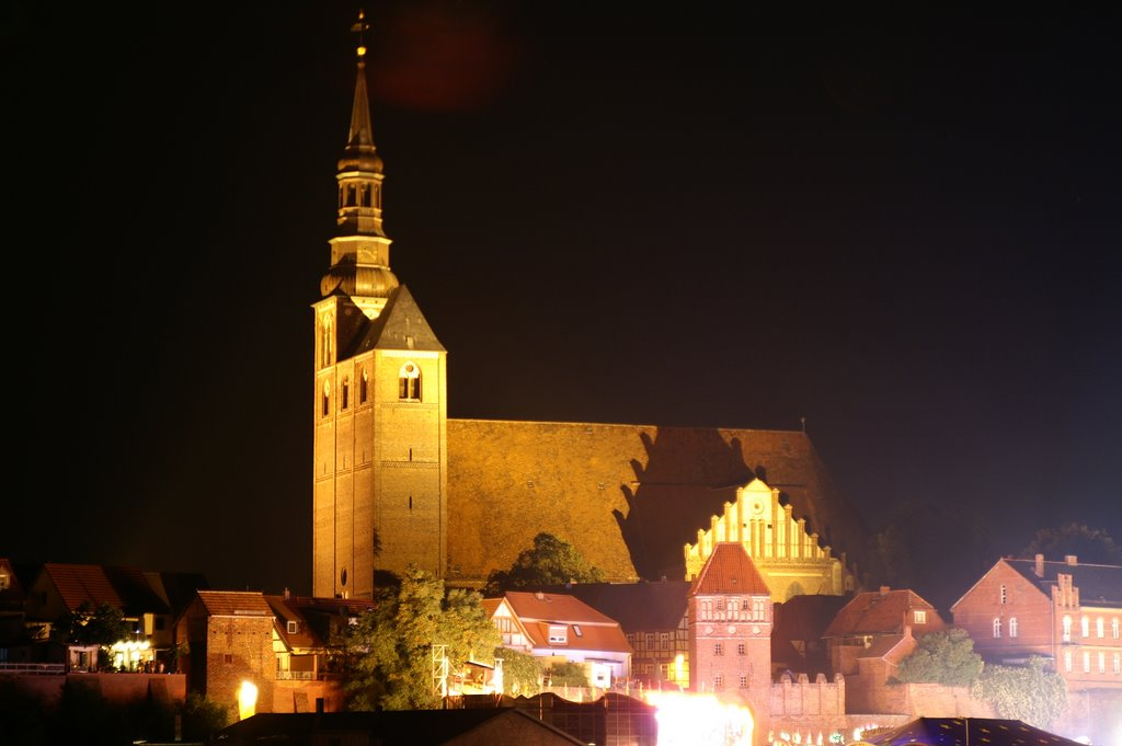 Stephanskirche Tangermünde